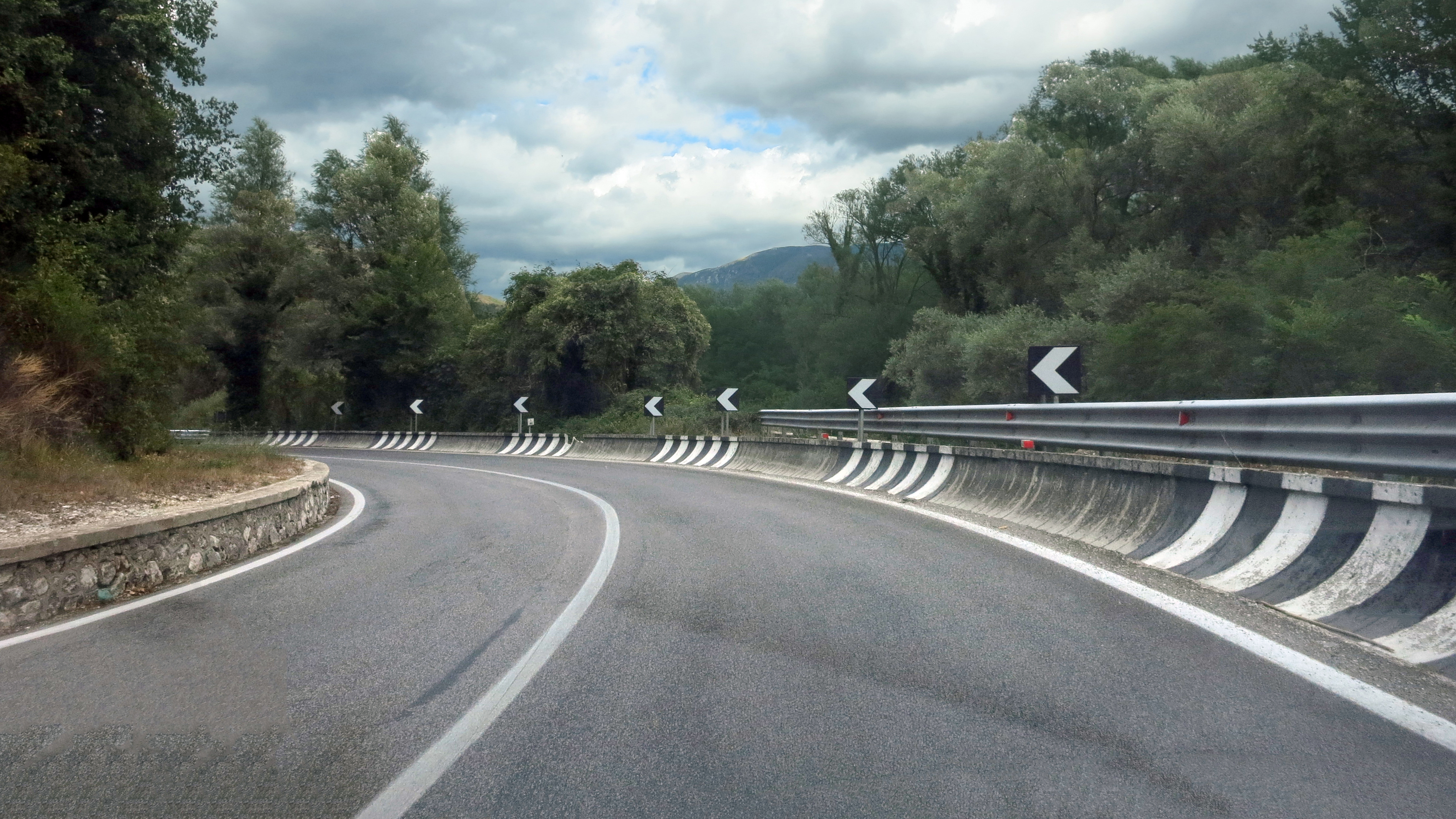 Curva al km 92 della strada statale 4 Via Salaria, tra Vasche e Canetra (frazioni di Castel Sant'Angelo), percorsa in direzione Antrodoco